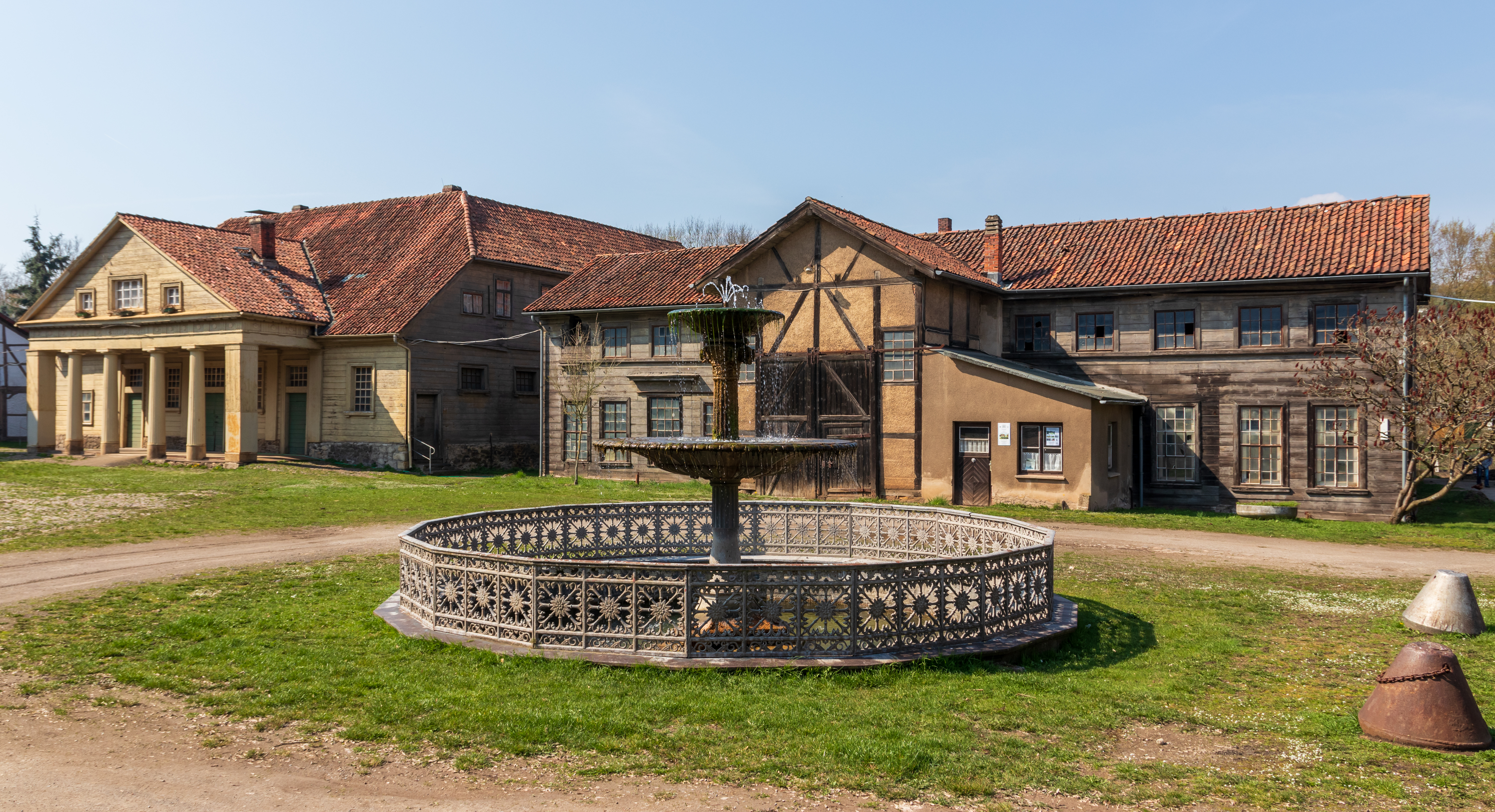 Königshütte (Bad Lauterberg) – Springbrunnen aus Gusseisen, gefertigt 1889 für die Weltausstellung in Paris (ob er wirklich dort war, ist umstritten), anschließend in der Mitte des Platzes aufgestellt. Die Königshütte in Bad Lauterberg im Harz ist eine ehemalige Hochofenanlage, Gießerei und Drahtzieherei aus der Zeit des frühen 19. Jahrhunderts. Sie war das größte kurhannoversche Eisenhüttenwerk und steht als technisches Denkmal unter Denkmalschutz.